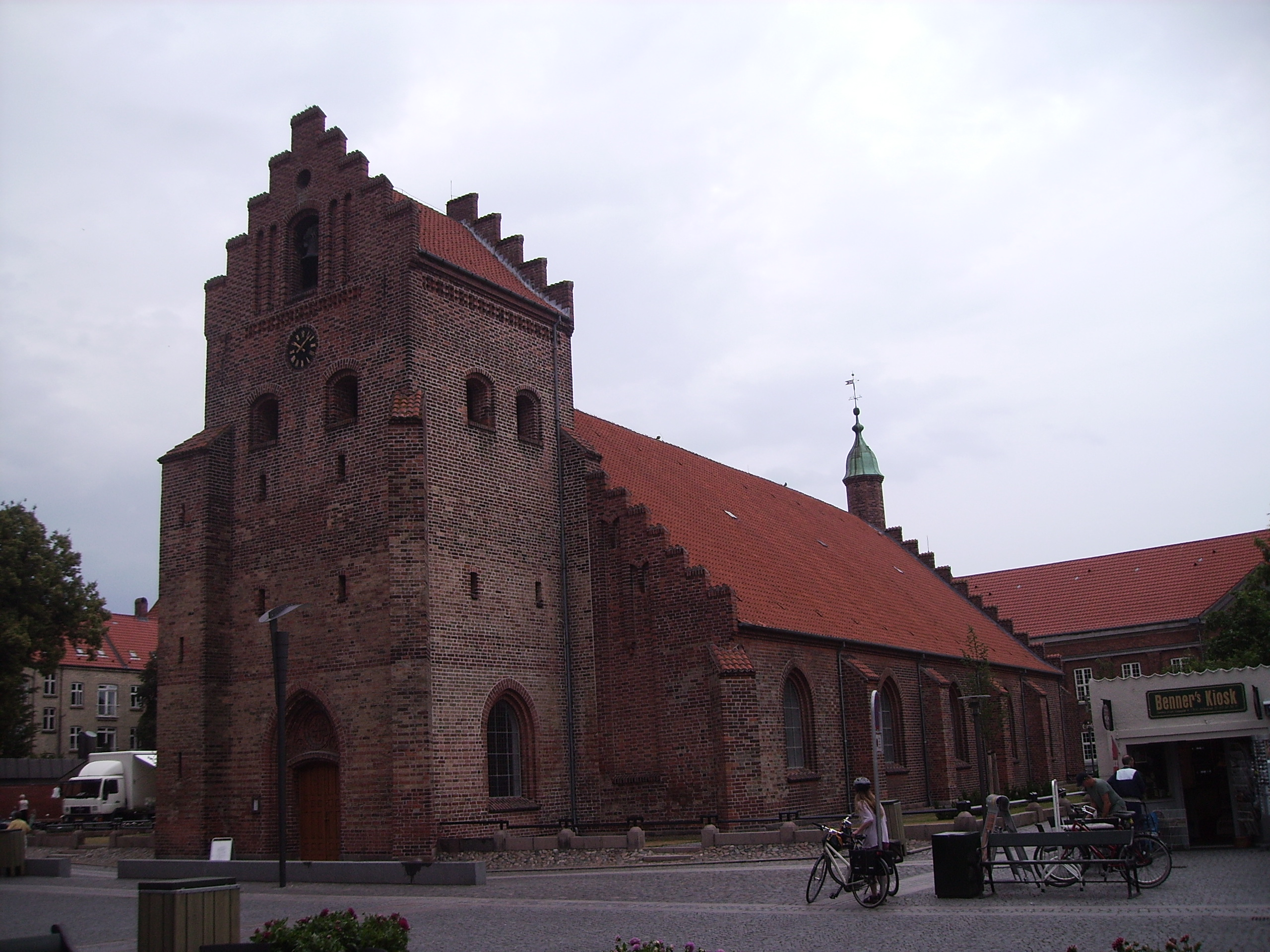 Sankt Laurenti Kirke, Kerteminde Sogn, Bjerge Herred, Odense Amt, Denmark (Danish Church) - Sankt Laurenti Kirke fra sydvest